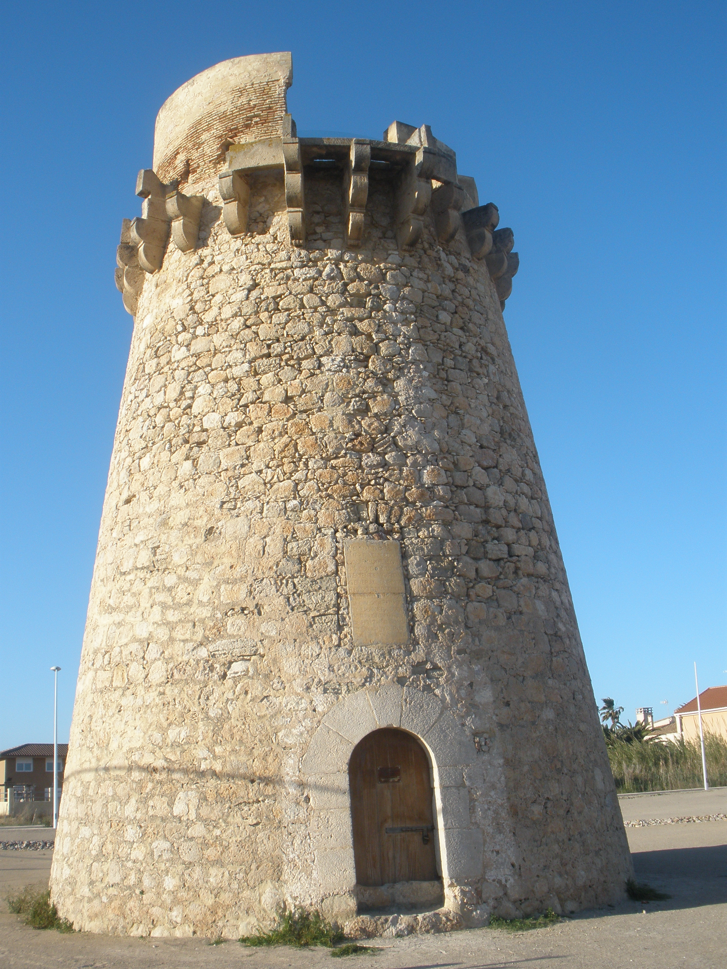 Torre de defensa situada al Marenyet